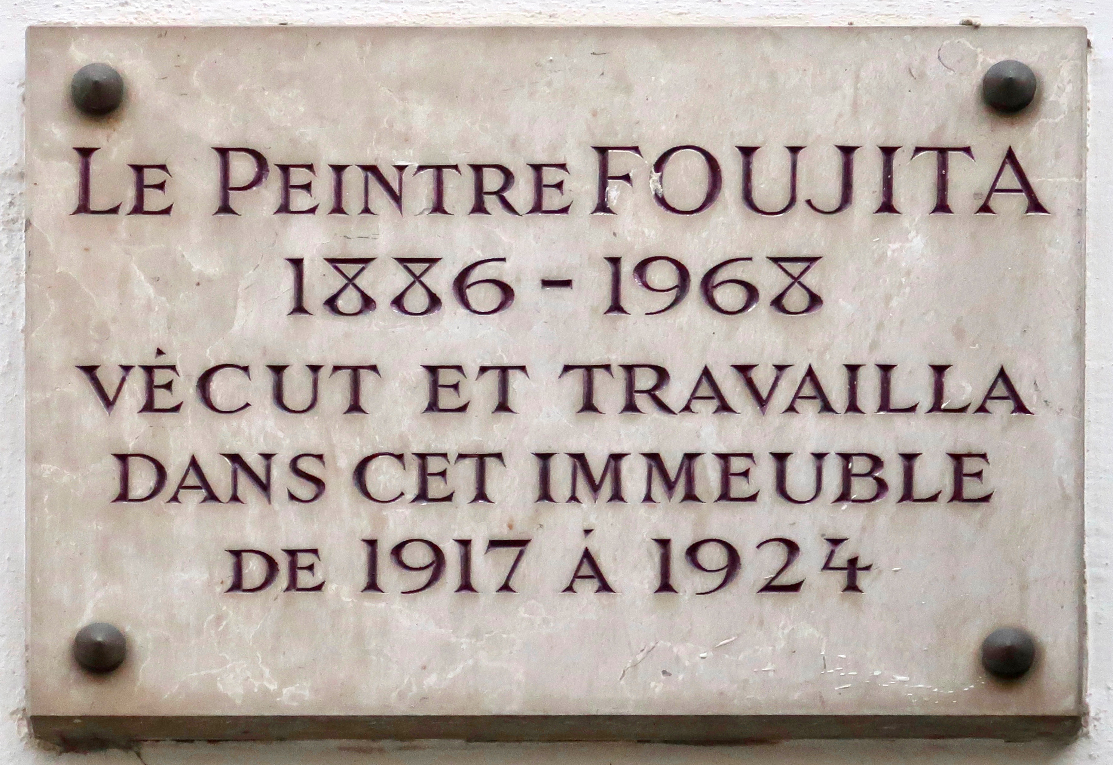 Plaque en hommage à Foujita, 5 rue Delambre (Paris, 14e).